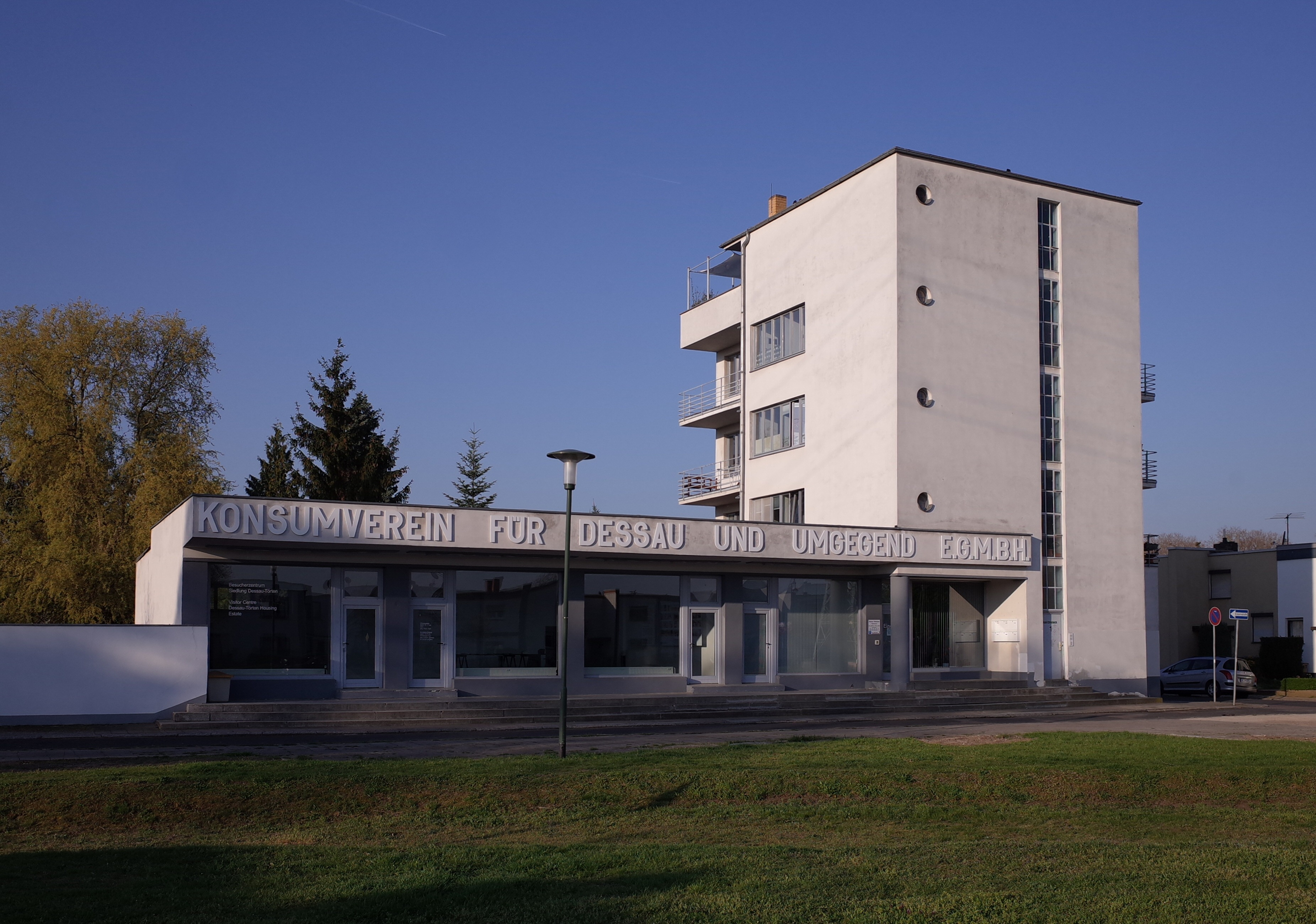 Dessau-Roßlau, das Konsumgebäude ist 1928 nach einem Entwurf von Walter Gropius entstanden. Heute gehört es zum UNESCO-Welterbe Bauhaus[1] und ist das Besucherzentrum der Siedlung Dessau-Törten[2].